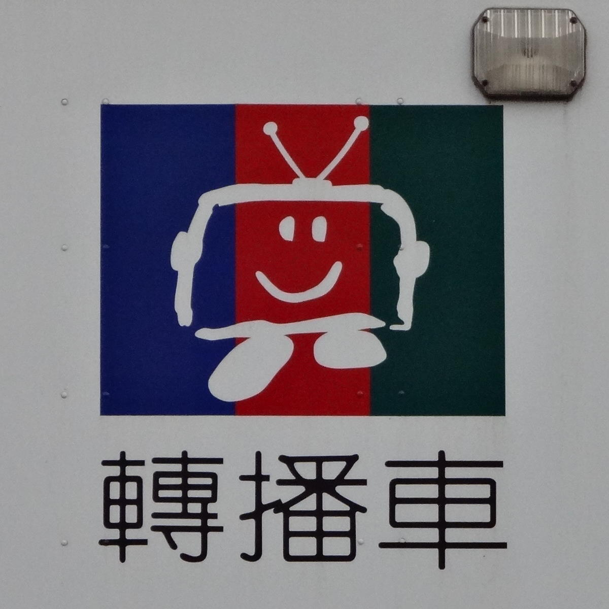 臺灣電視公司戶外轉播車BP-366左側的第一代「台視寶寶」，其背景是台視第一代企業識別標誌時期的台視公司旗底色。